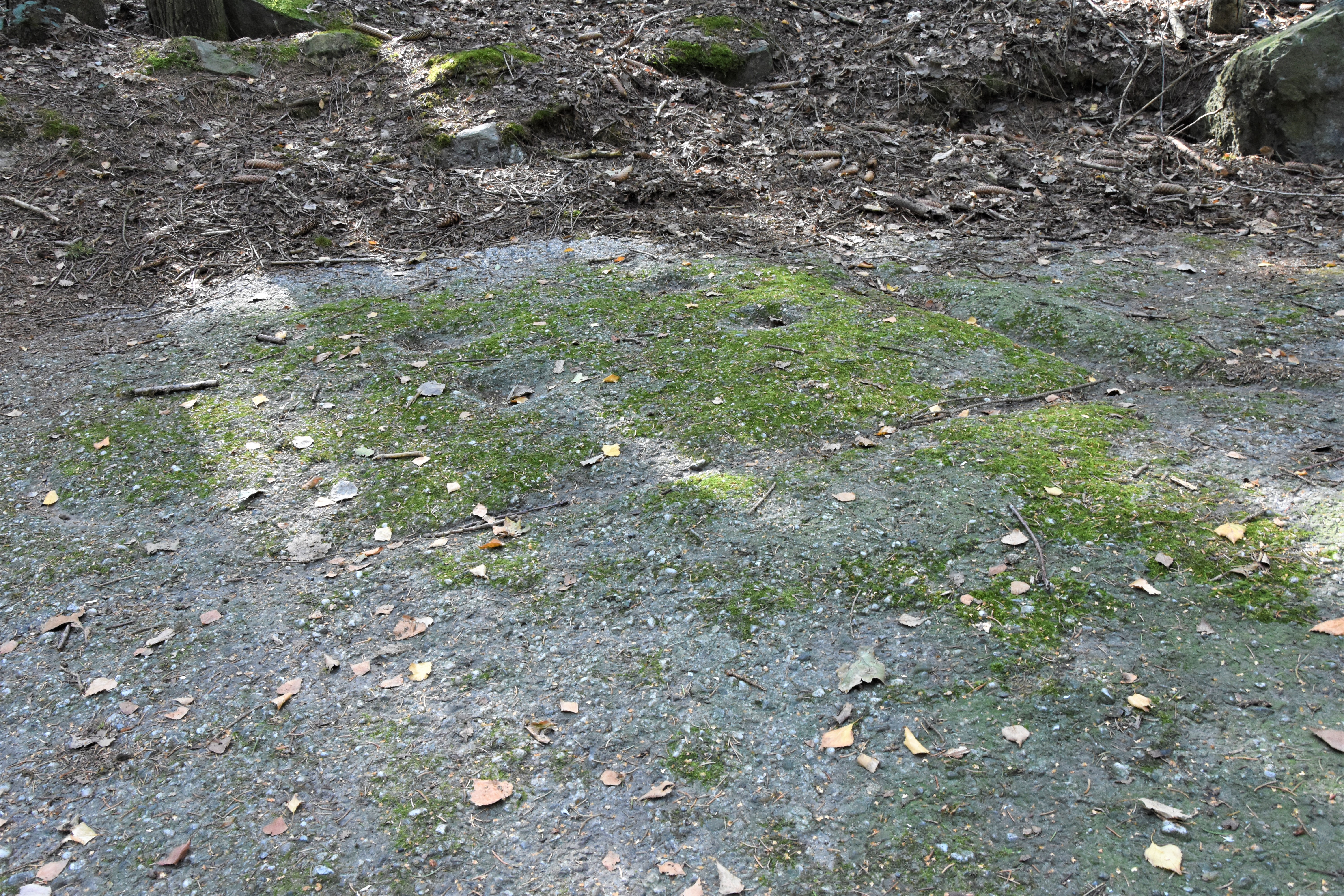 Knieanbetungsstein